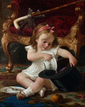 Fortsetzung von Image:Crosio Kinderstreich 1.jpg: Das Kind leert eine Tasse in den Hut aus.